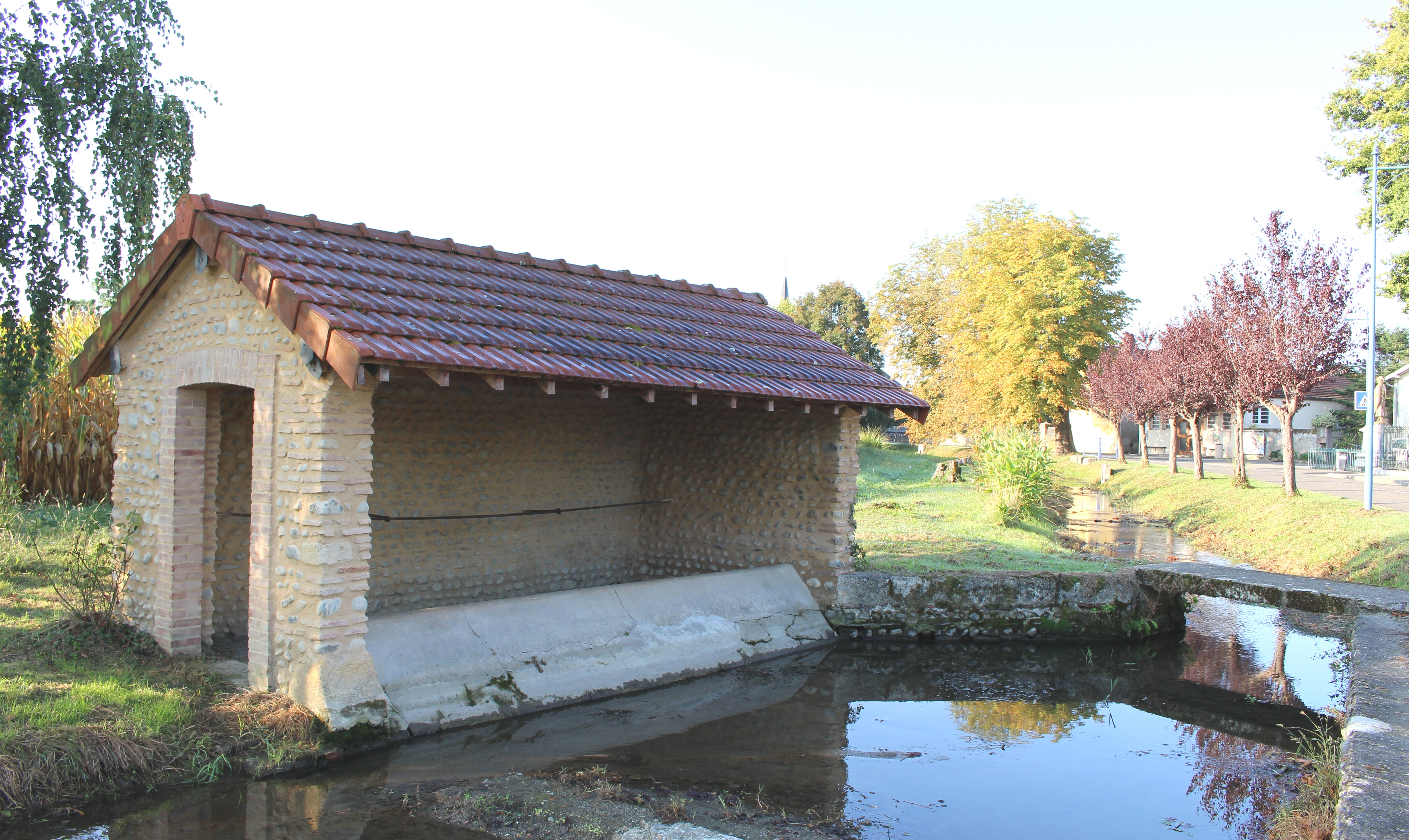 Lavoir de Nouilhan (Hautes-Pyrénées)